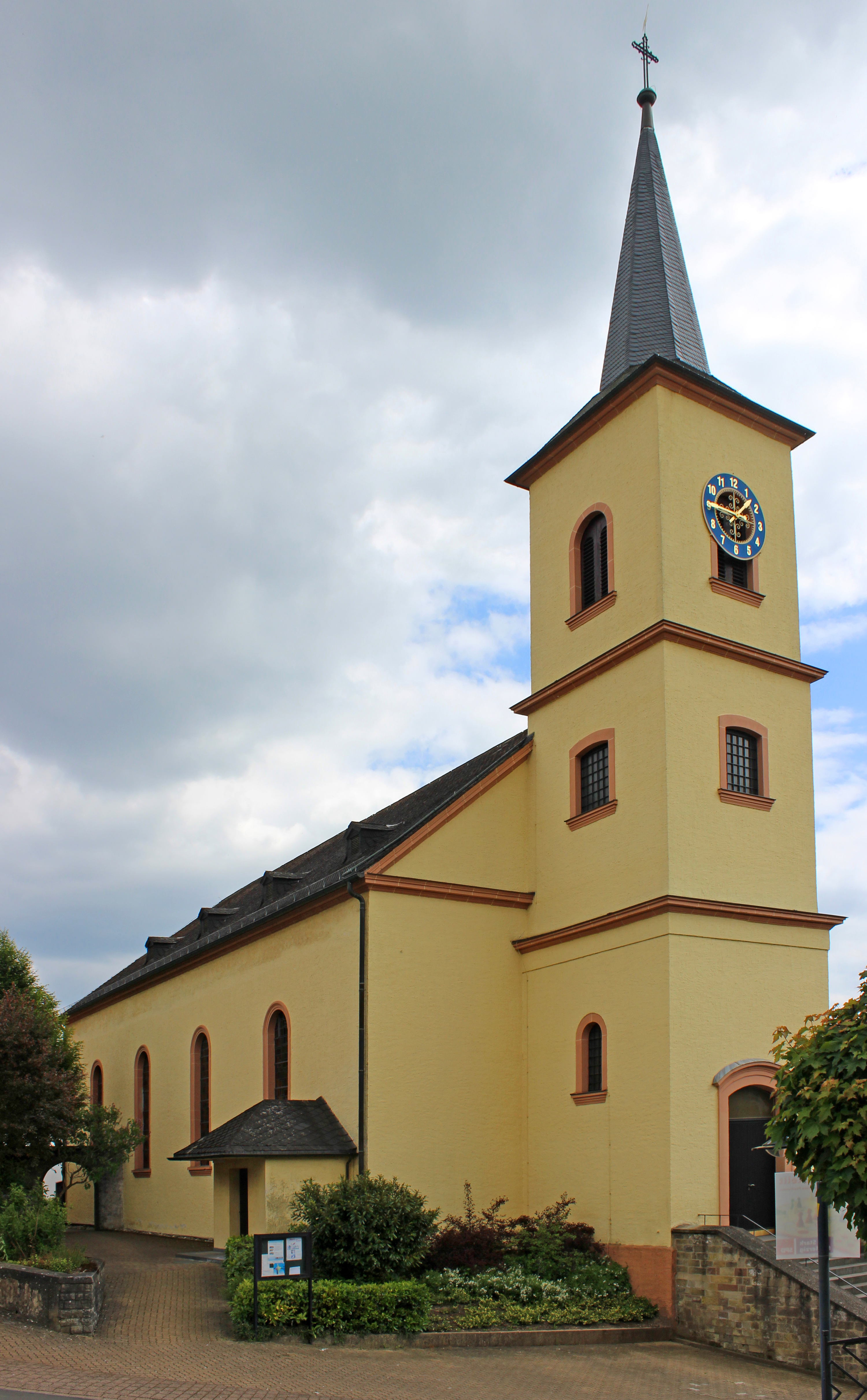 Die katholische Pfarrkirche St. Johannes der Täufer in Mondorf, einem Stadtteil von Merzig, Landkreis Merzig-Wadern, Saarland